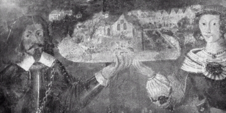 Fundatorzy kaplicy Weyherów w Farze Puckiej - Ernest i Anna z Mortęskich Weiher - obraz z wnętrza kaplicy, zdj. cz-b, przed konserwacją (lata 70-te), po retuszu.